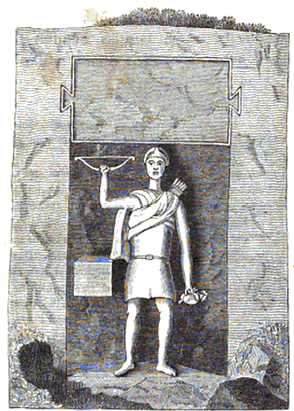 Abzeichnung eines römischen Steinreliefs, sog. Robin of Risingham (Darstellung e. lokal verehrten Jagdgottes, die des römischen Gott des Waldes, Silvanus, oder des keltischen Gottes Cocidius.) vor seiner Zerstörung im 18. Jahrhundert von John Horsley.